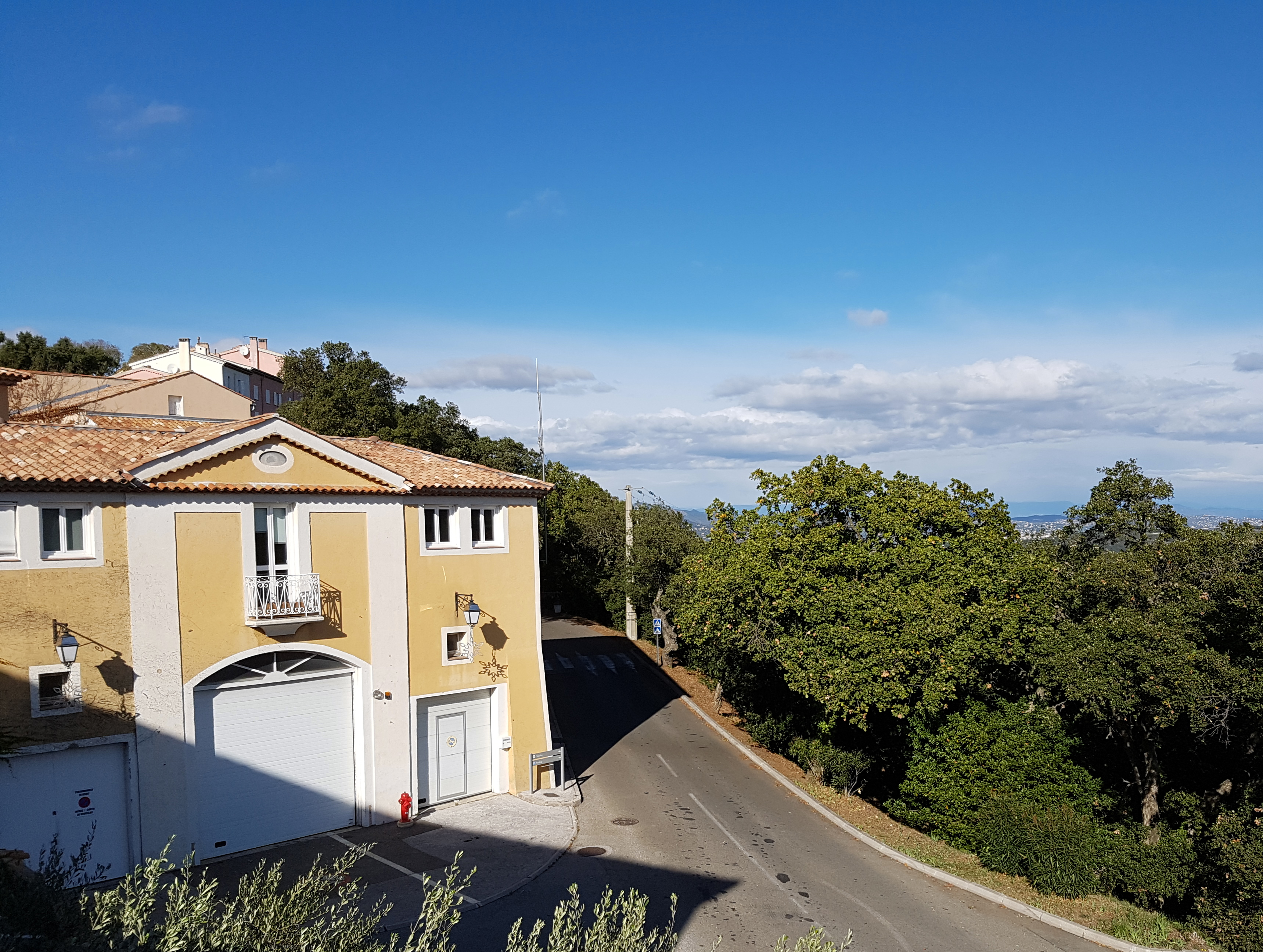 vue de la caserne des pompiers de Gassin